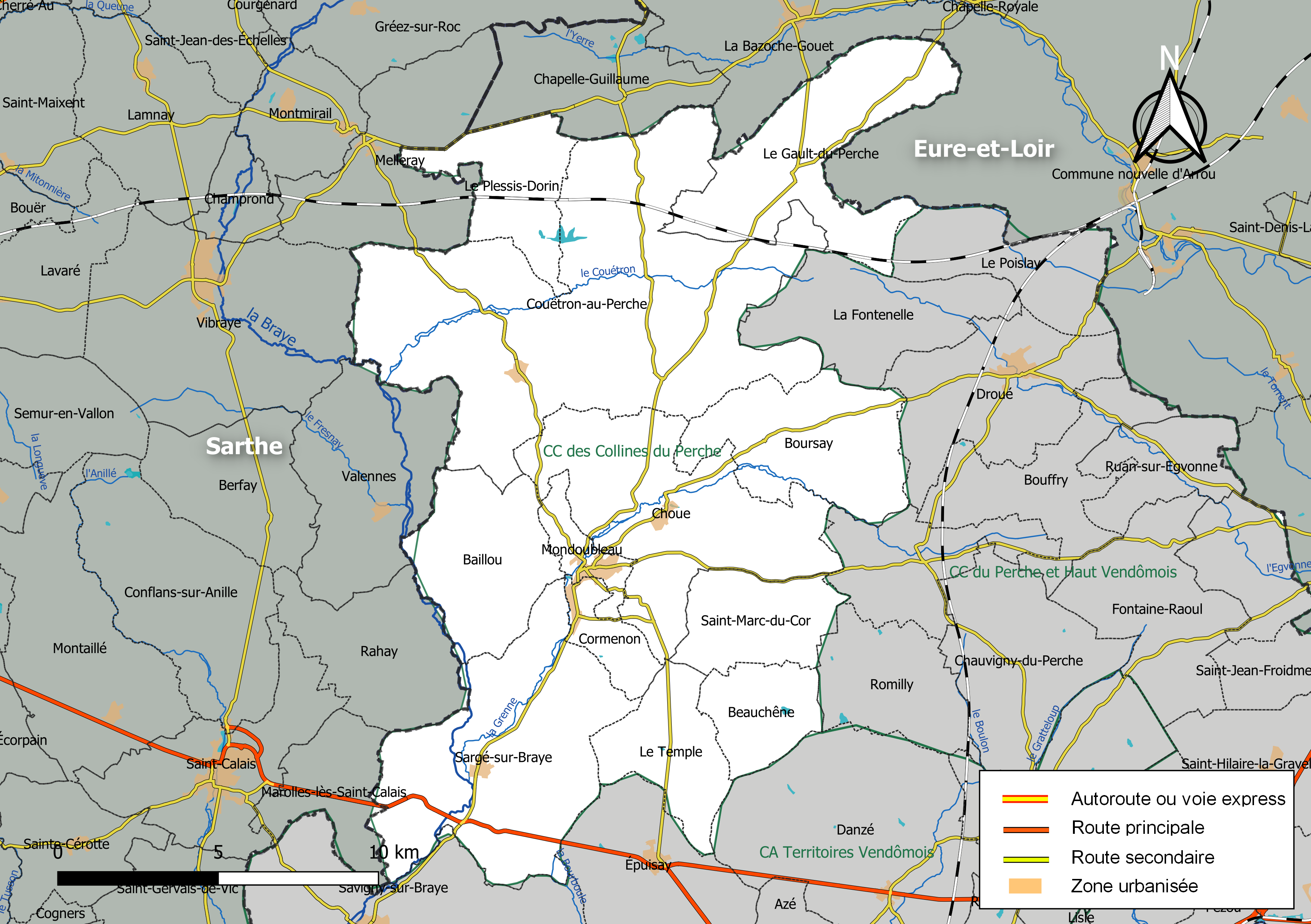 Carte de la communauté de communes des Collines du Perche, département de Loir-et-Cher, France. Composition au 1er janvier 2019.